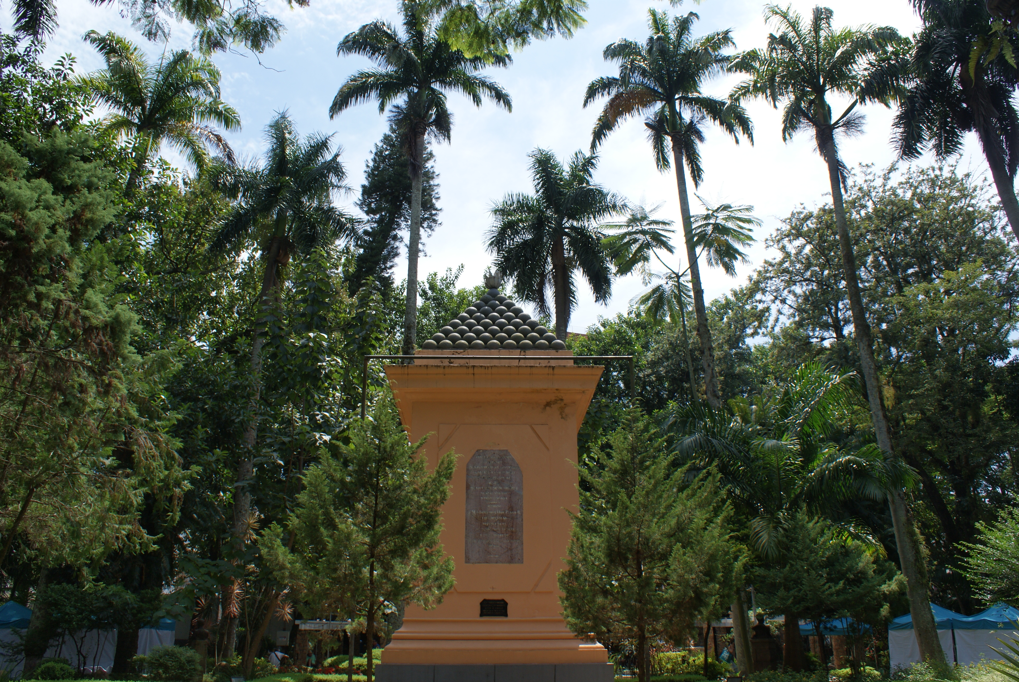 Monumento em Honra aos Heróis Mortos na Guerra do Paraguai, localizado na Praça XV de Novembro em Florianópolis, Brasil.